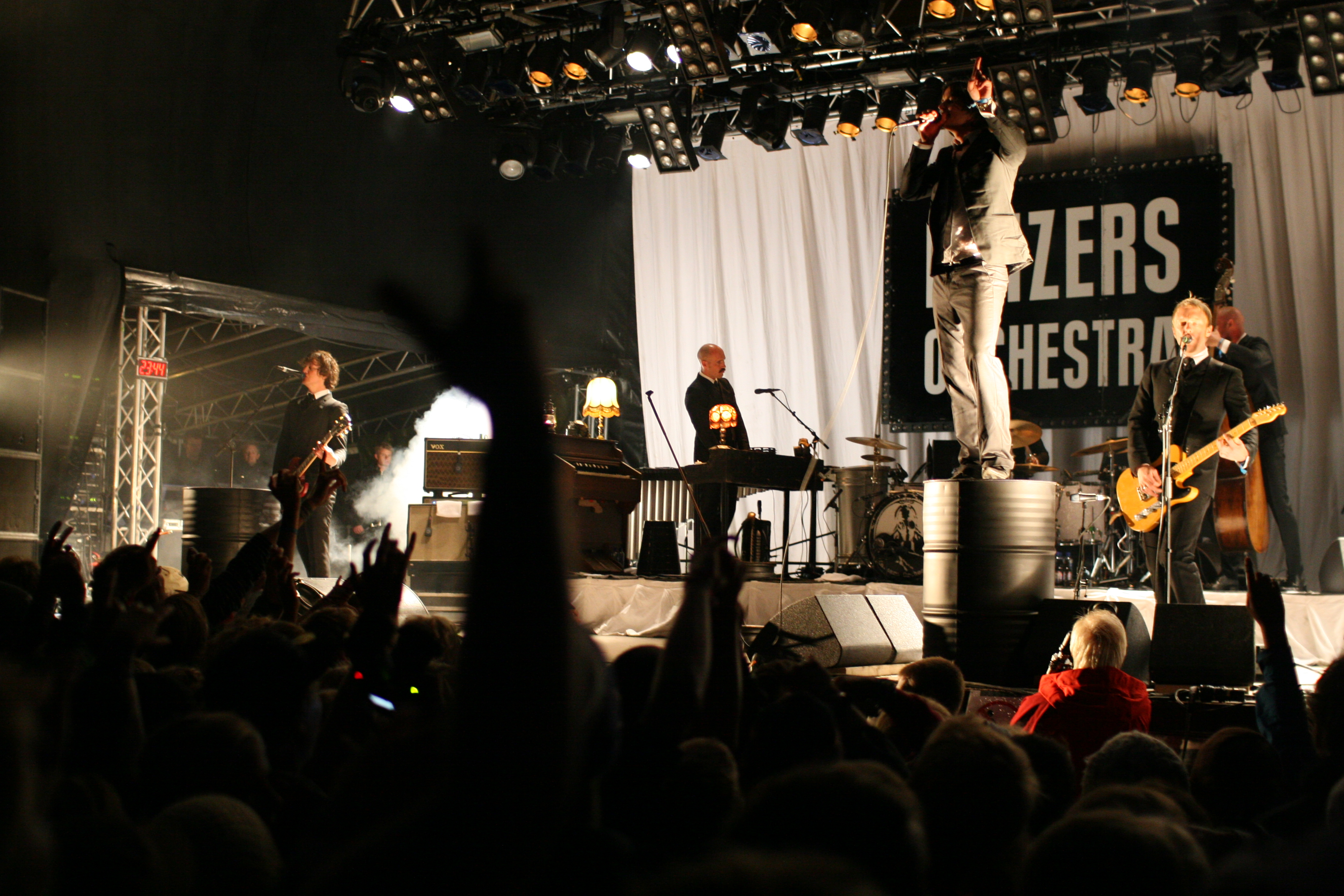 Kaizers Orchestra på Vinjerock i 2008